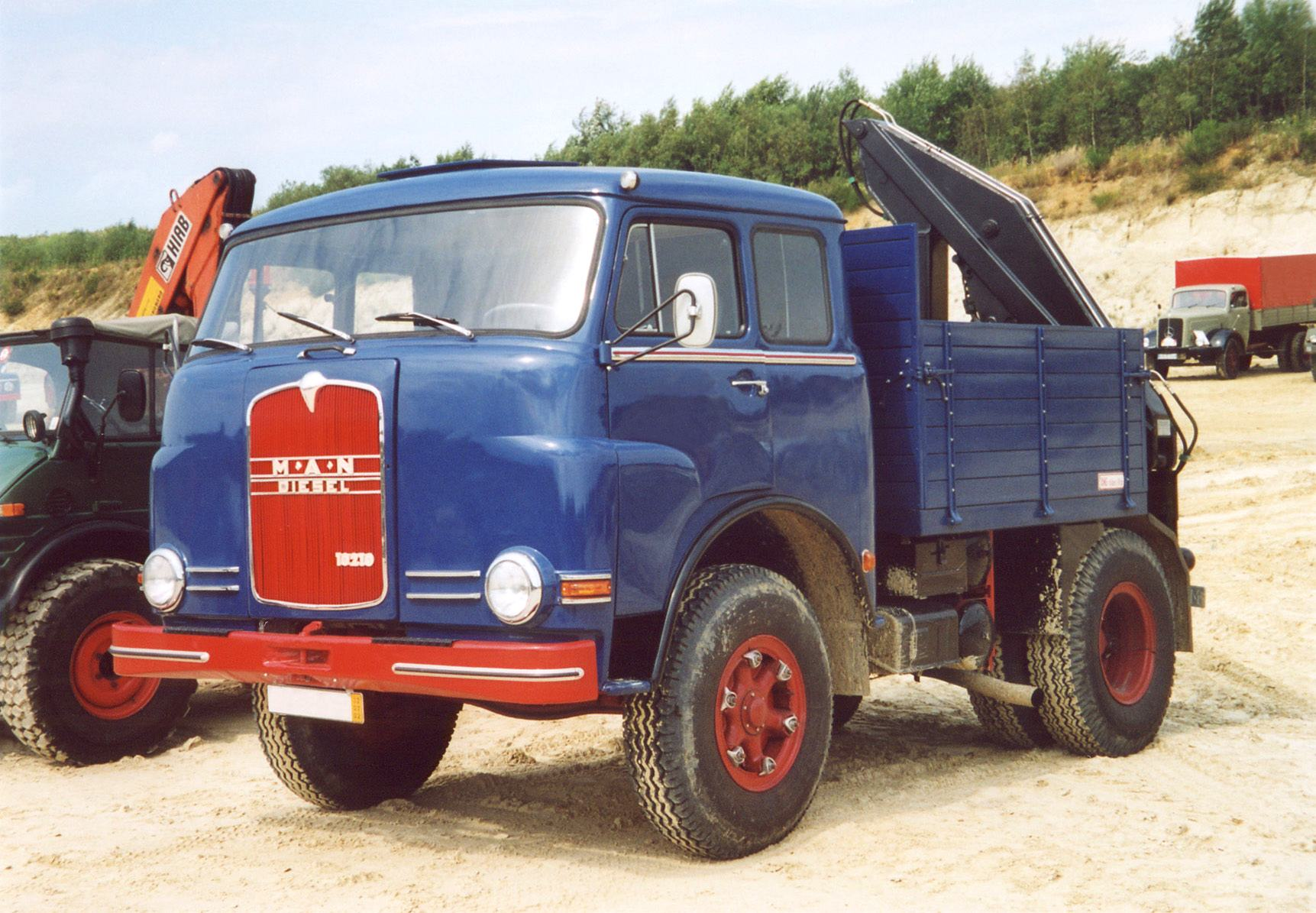 MAN-Zugmaschine, schwere „Pausbacke“ (Typ 10210 F)